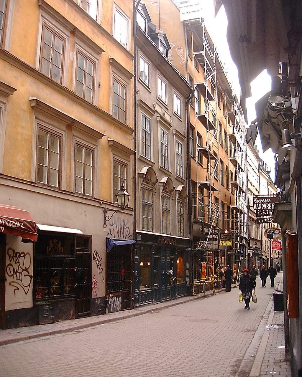 63, Västerlånggatan. Gamla stan, Stockholm.